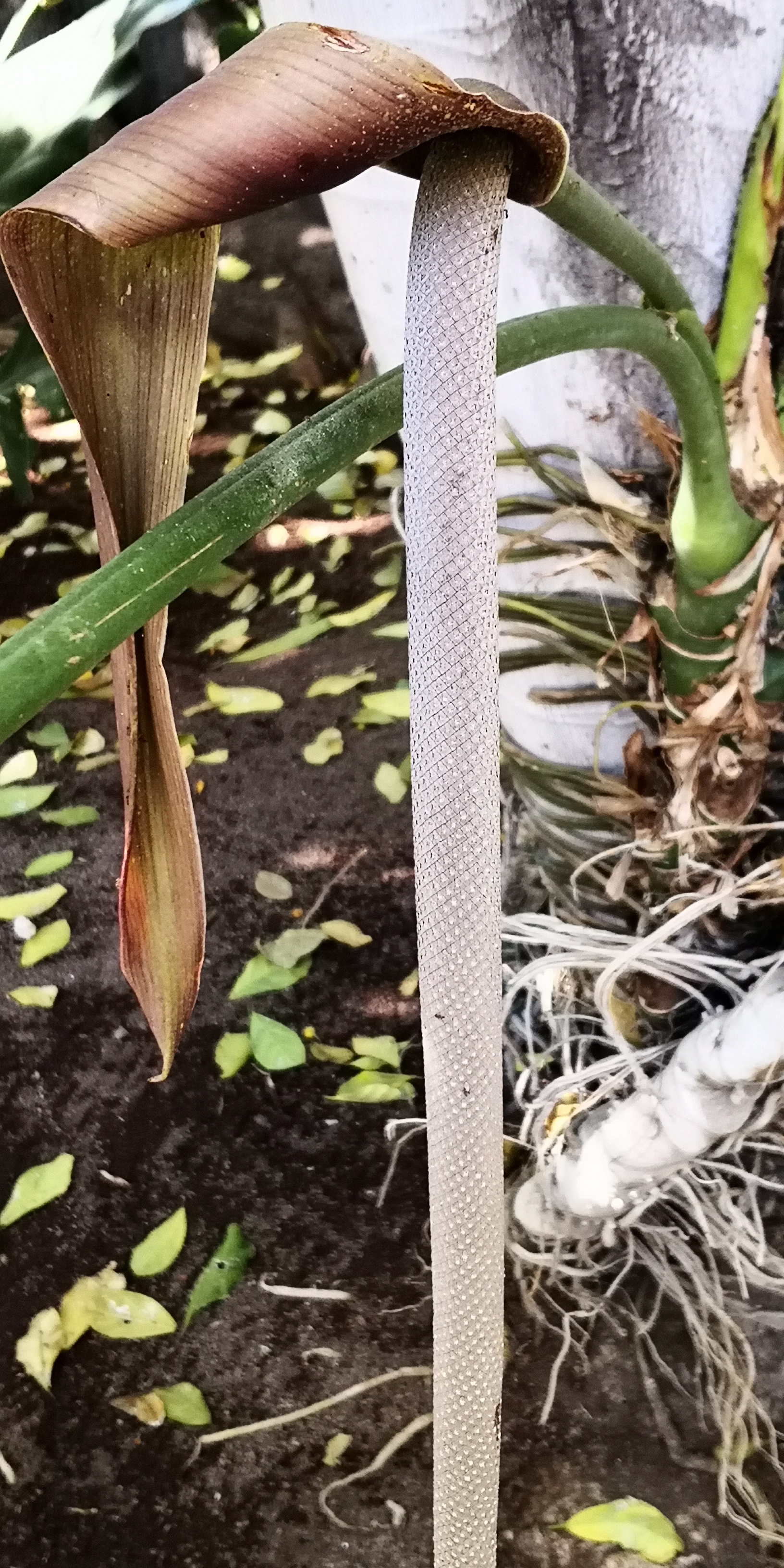 Standort: Palmetum in Santa Cruz de Tenerife, Kanarische Inseln, Spanien. Februar 2020. 28,452 -16,256